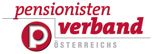 Logo des Pensionistenverband Österreichs